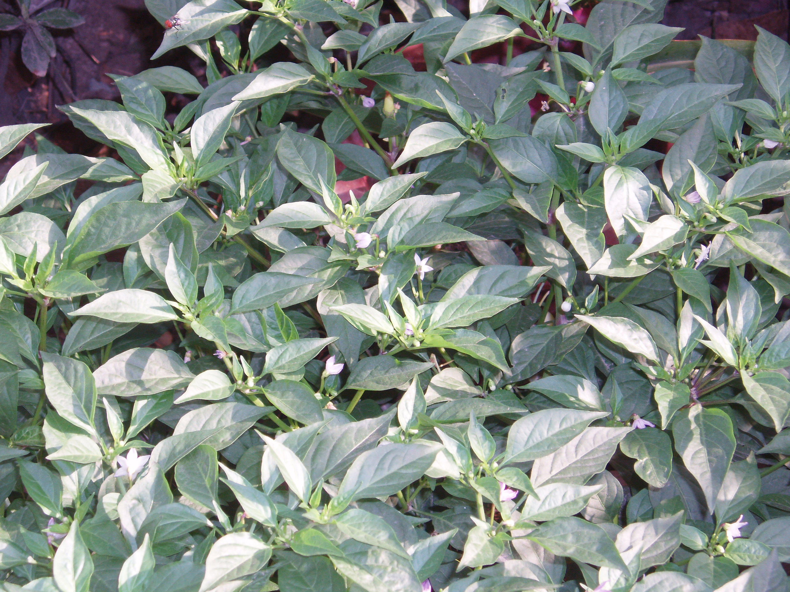 Cone pepper